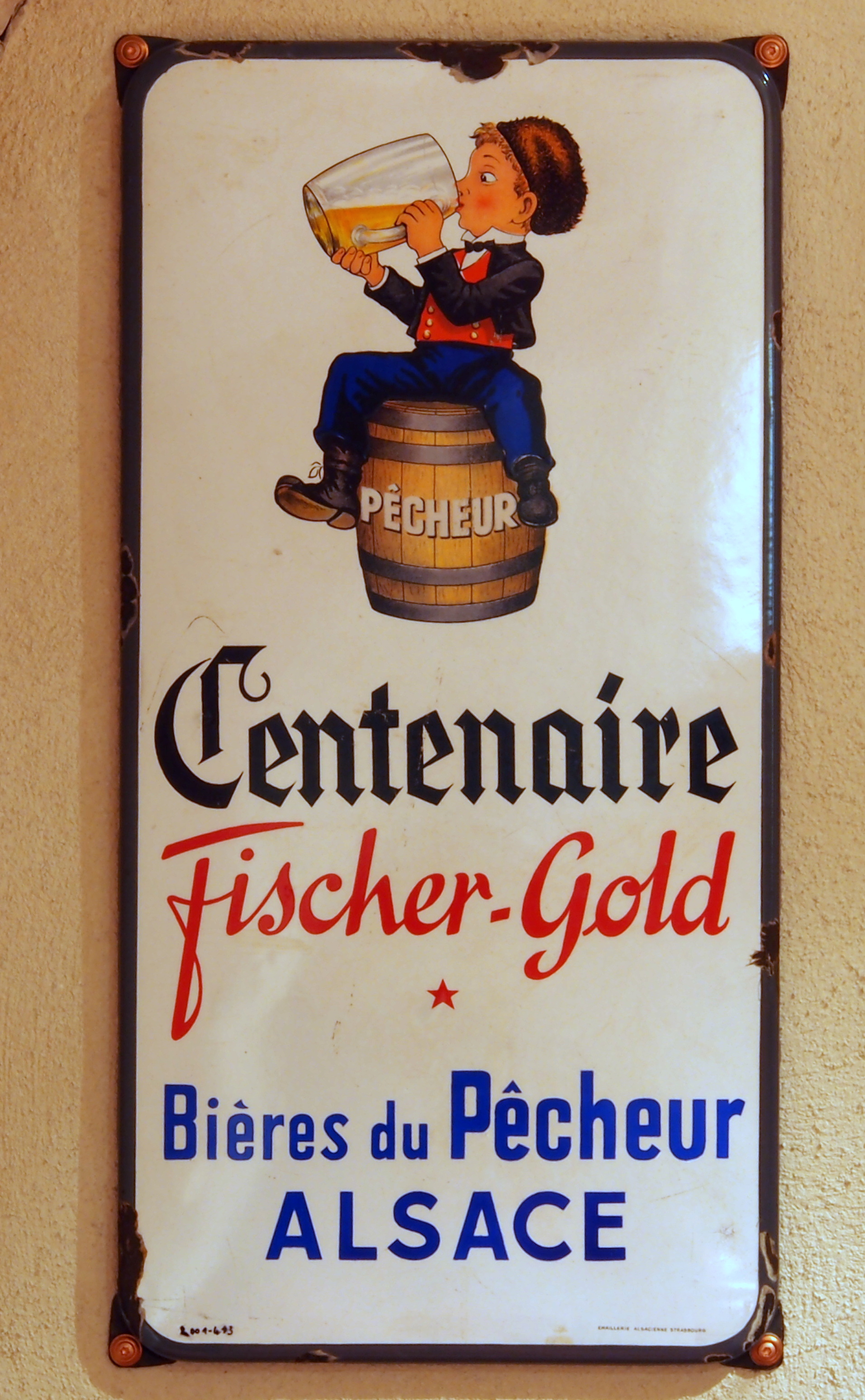 Emaillewerbeschild der Brauerei Fischer